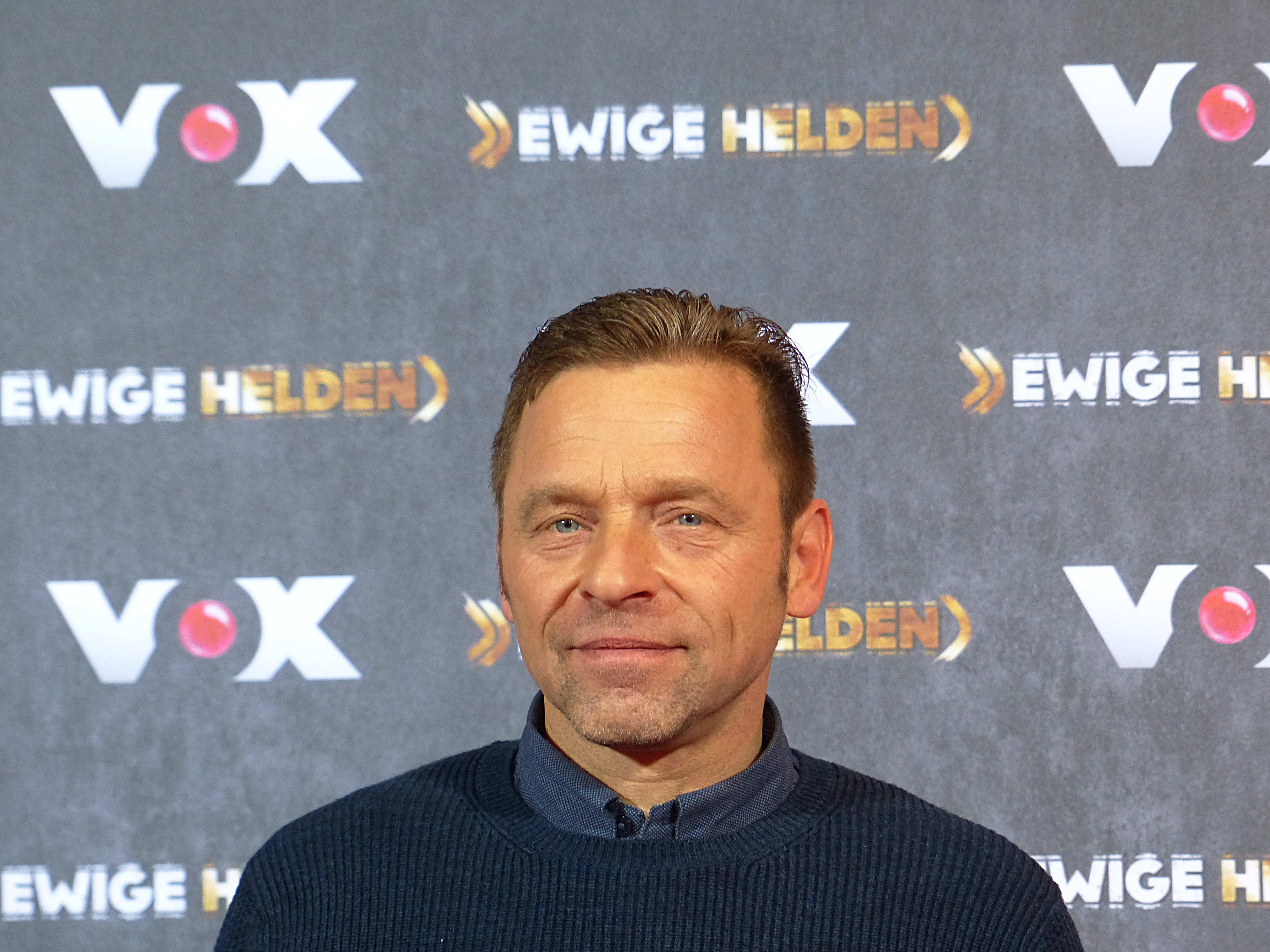 Thomas Häßler beim VOX "Ewige Helden" Pressetermin, im Dezember 2015.